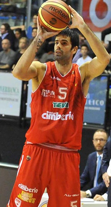 Dušan Šakota e il coach Massimo Cancellieri